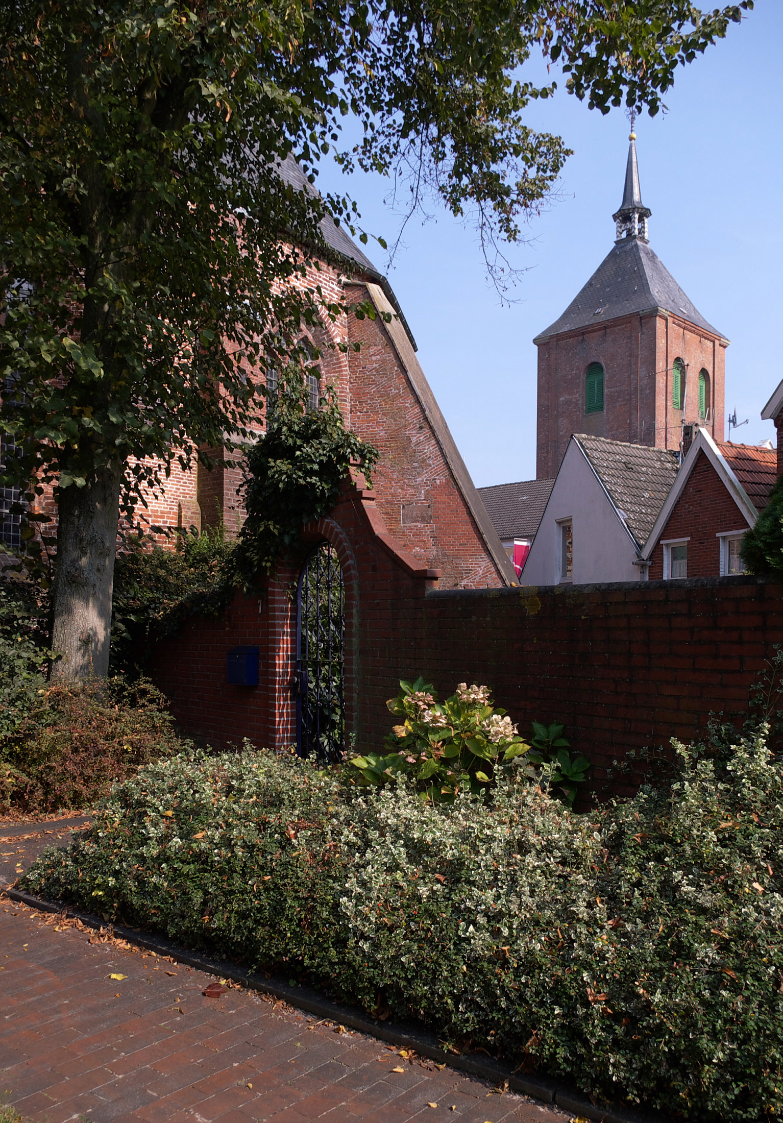 Georgskirche Weener, Emsland